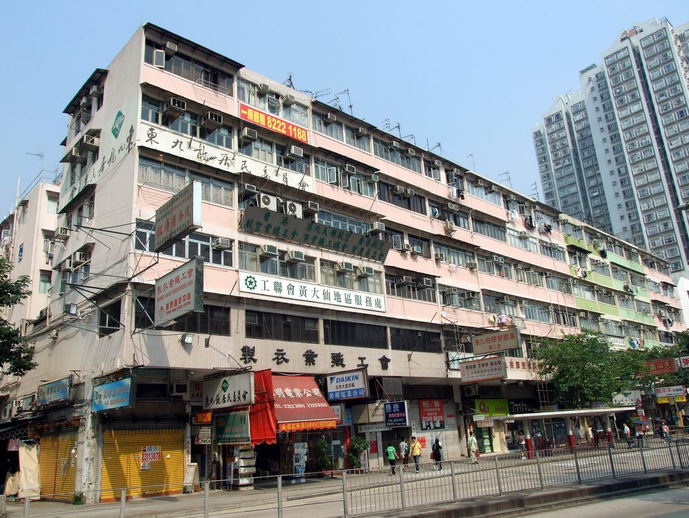 東九龍居民委員會, 九龍新蒲崗彩虹道16-18號3樓(該會已遷至新蒲崗大有街32號泰力工業中心1201室)